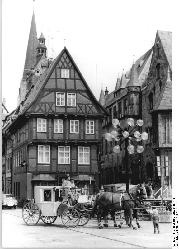 Quedlinburg, Marktplatz, Hochzeitskutsche ADN-ZB Martin-18.6.84 Bez. Halle: Ein beliebtes Ziel für zukünftige Ehepaare. Vor der malerischen Kulisse alter Fachwerkbauten fährt eine weiße Hochzeitskutsche auf dem Marktplatz von Quedlinburg zum Rathaus.